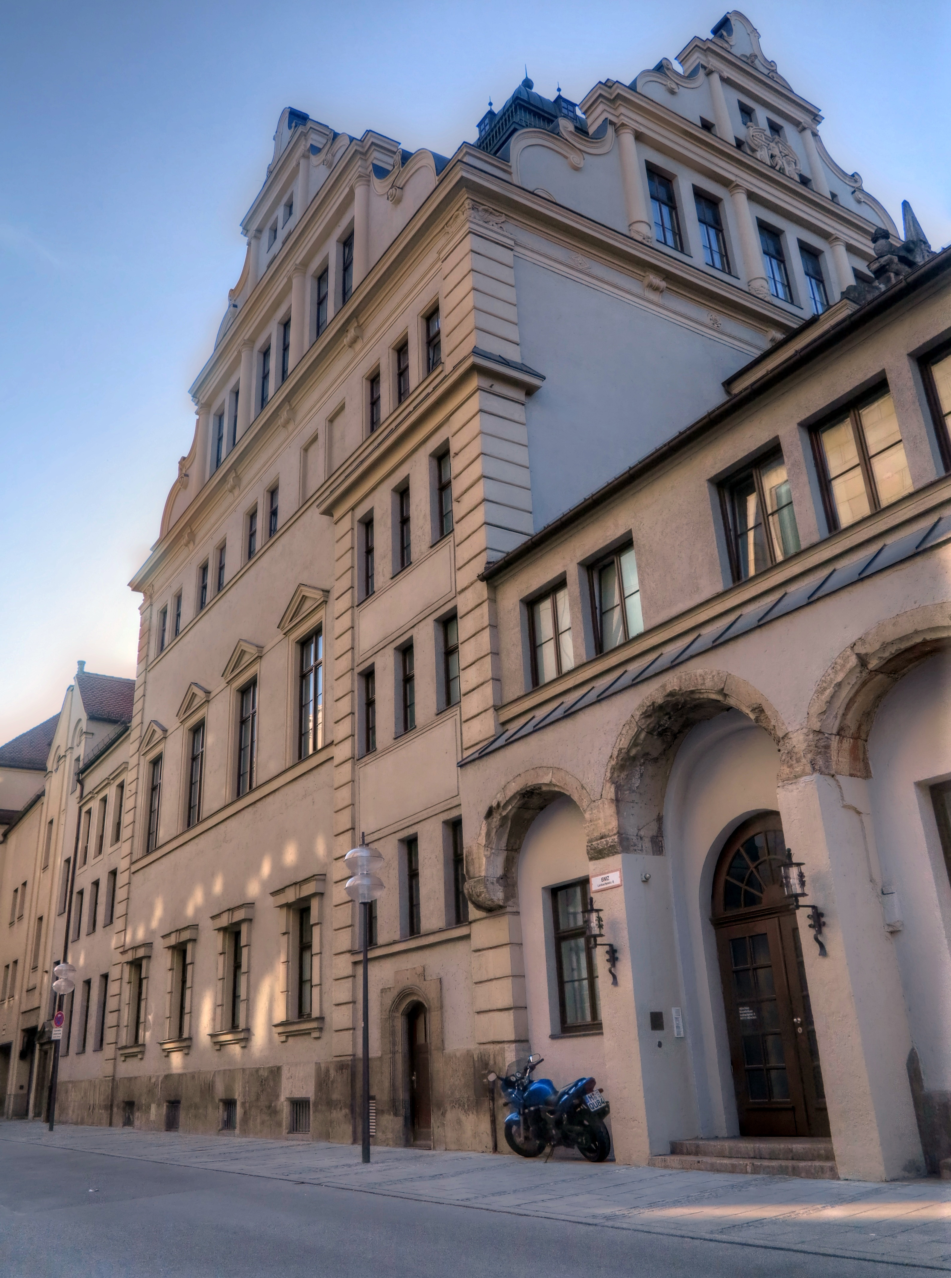 Deutschland, Bayern, München, Altstadt, Lehel, Künstlerhaus am Lenbachplatz Seiteneingang in der Herzog-Max-Straße